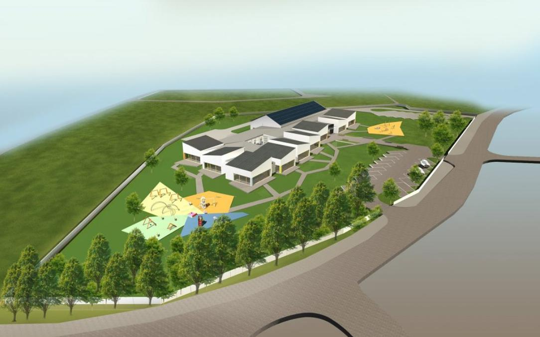 Nowo budowane przedszkole i żłobek w Kłodawie - wizualizacja